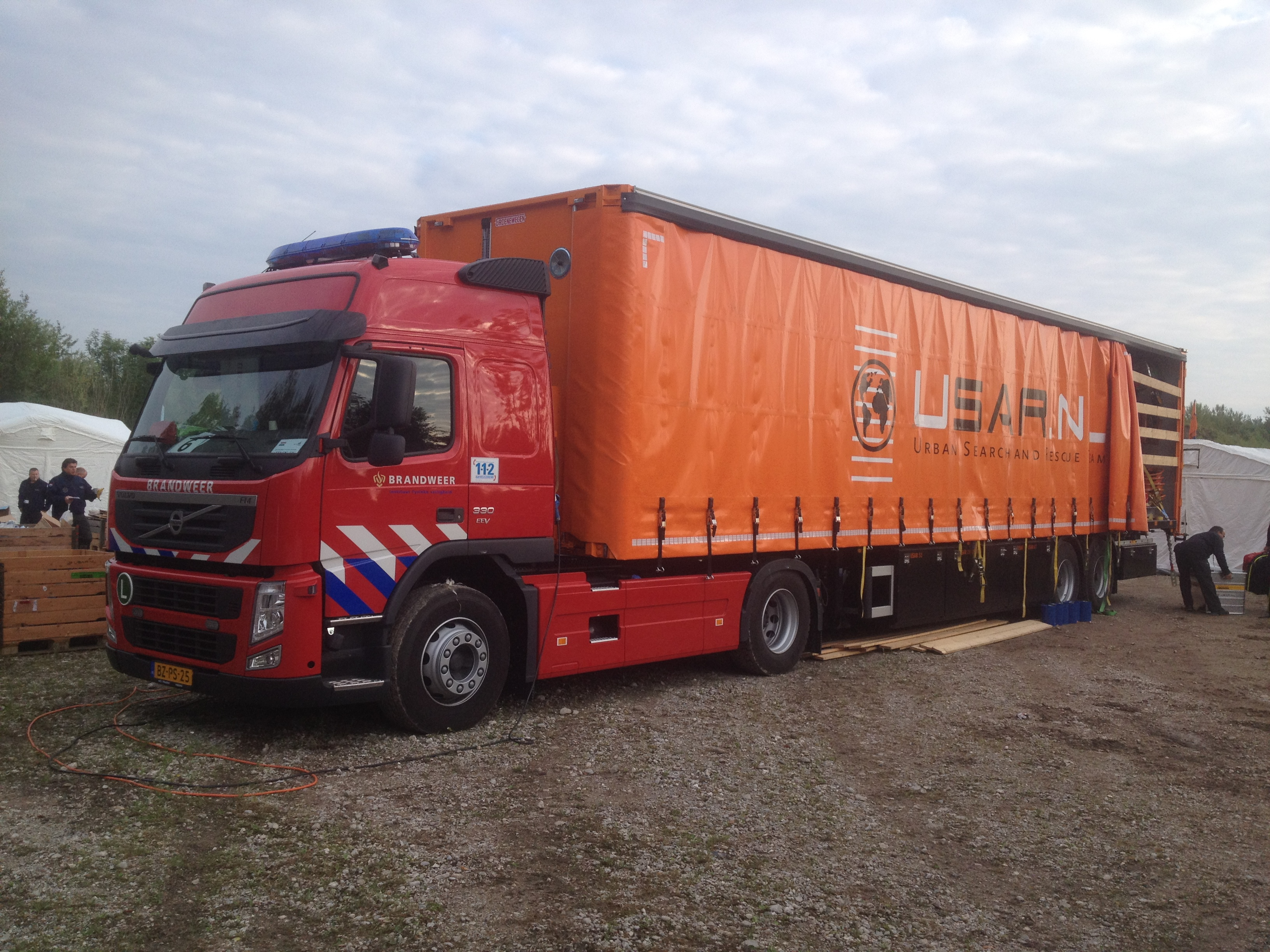 Truck mit Ausrüstung des Urban Search and Rescue Team Niederlande auf der Übung Taranis in Salzburg